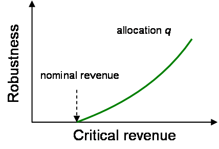 Opportuness curve